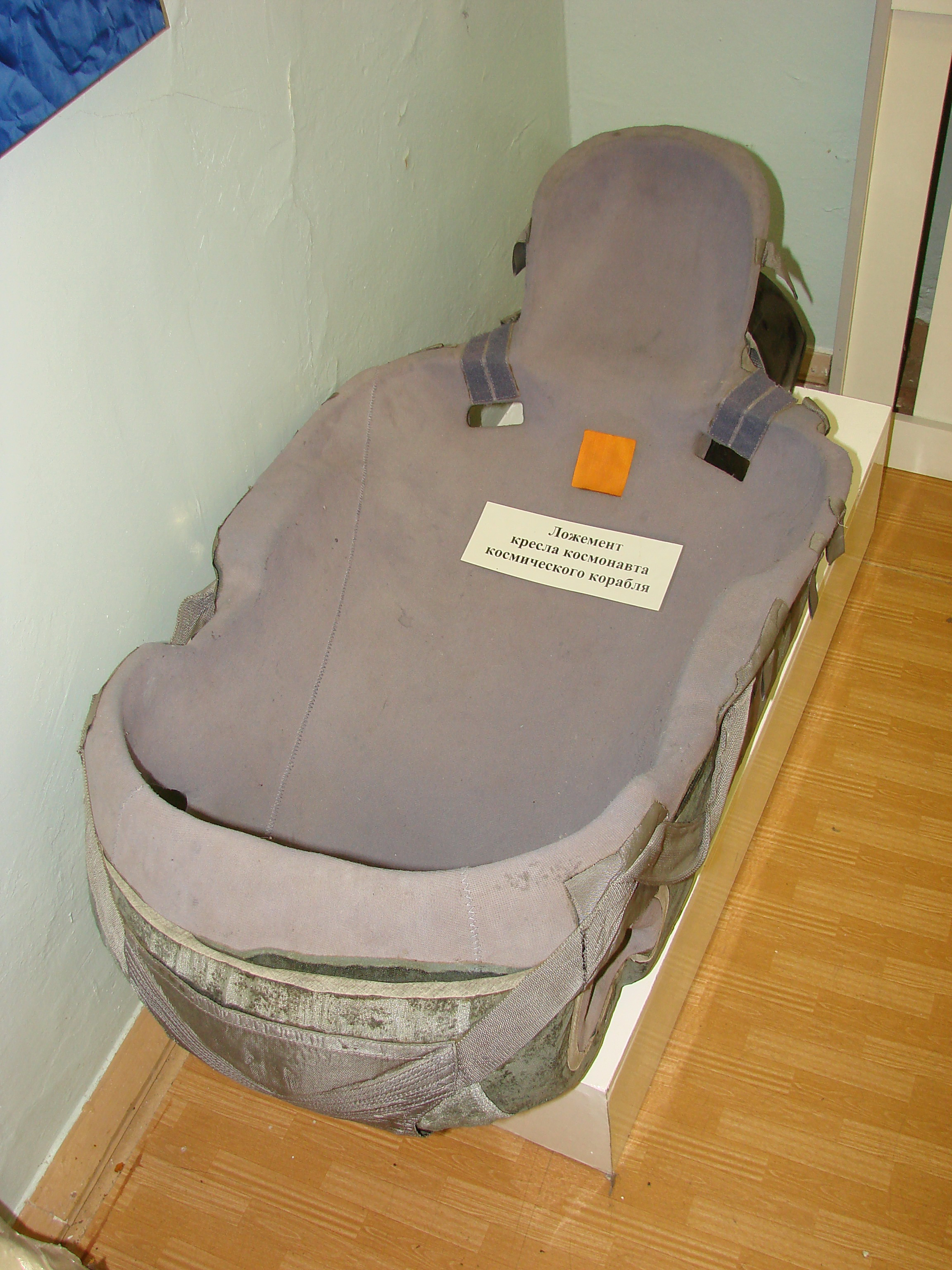 ложемент кресла космонавта космического корабля